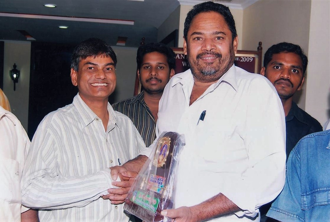 చలనచిత్ర దర్శకులు,నిర్మాత, హీరో ఆర్. నారాయణమూర్తి తో తెంటు సత్యనారాయణ